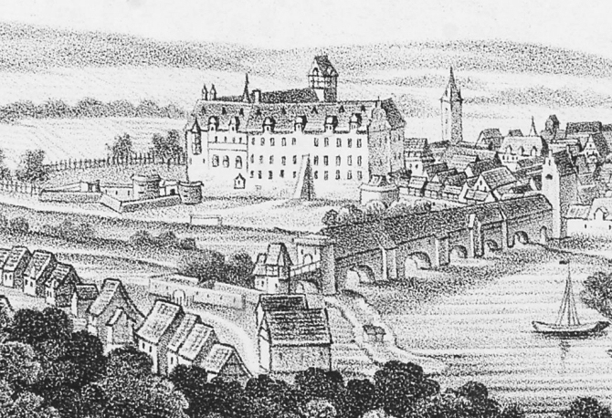 Welfenschloss (Hann. Münden)